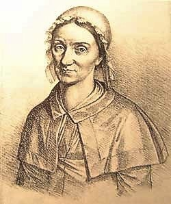 Gesche Margarethe Gottfried, geb. Timm, (* 6. März 1785 in Bremen, † 21. April 1831 in Bremen) war eine Serienmörderin, die durch Gabe von Arsen fünfzehn Menschen vergiftete.